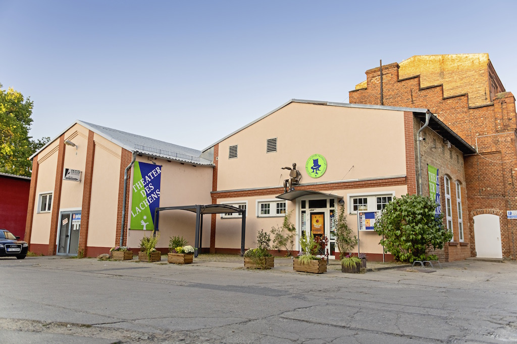 Frontseite neu